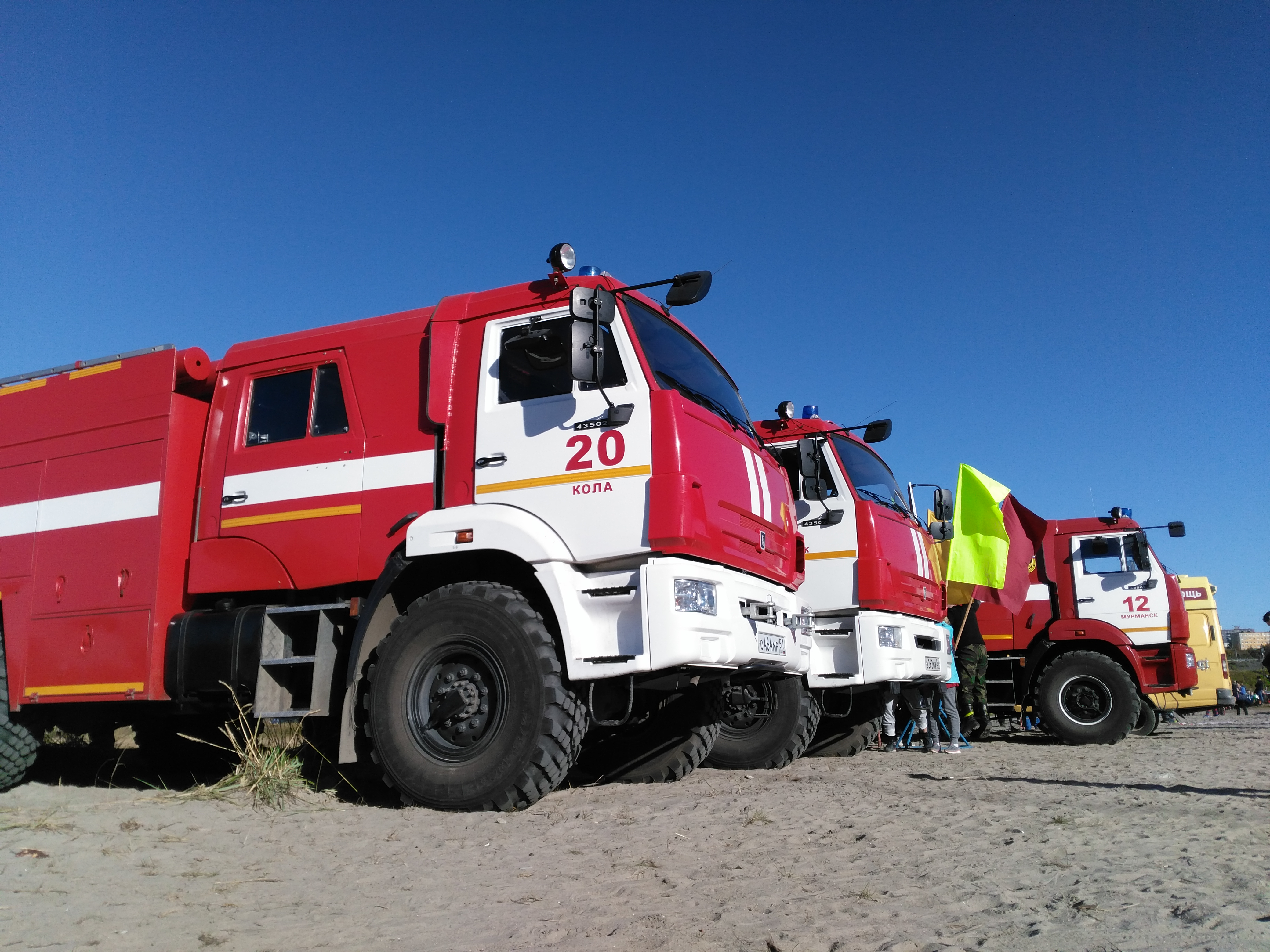 Состоят на службе в Коле и Мурманске. Принимали участие в мероприятиях спортивного события «Гольфстрим» в городе Мурманск.